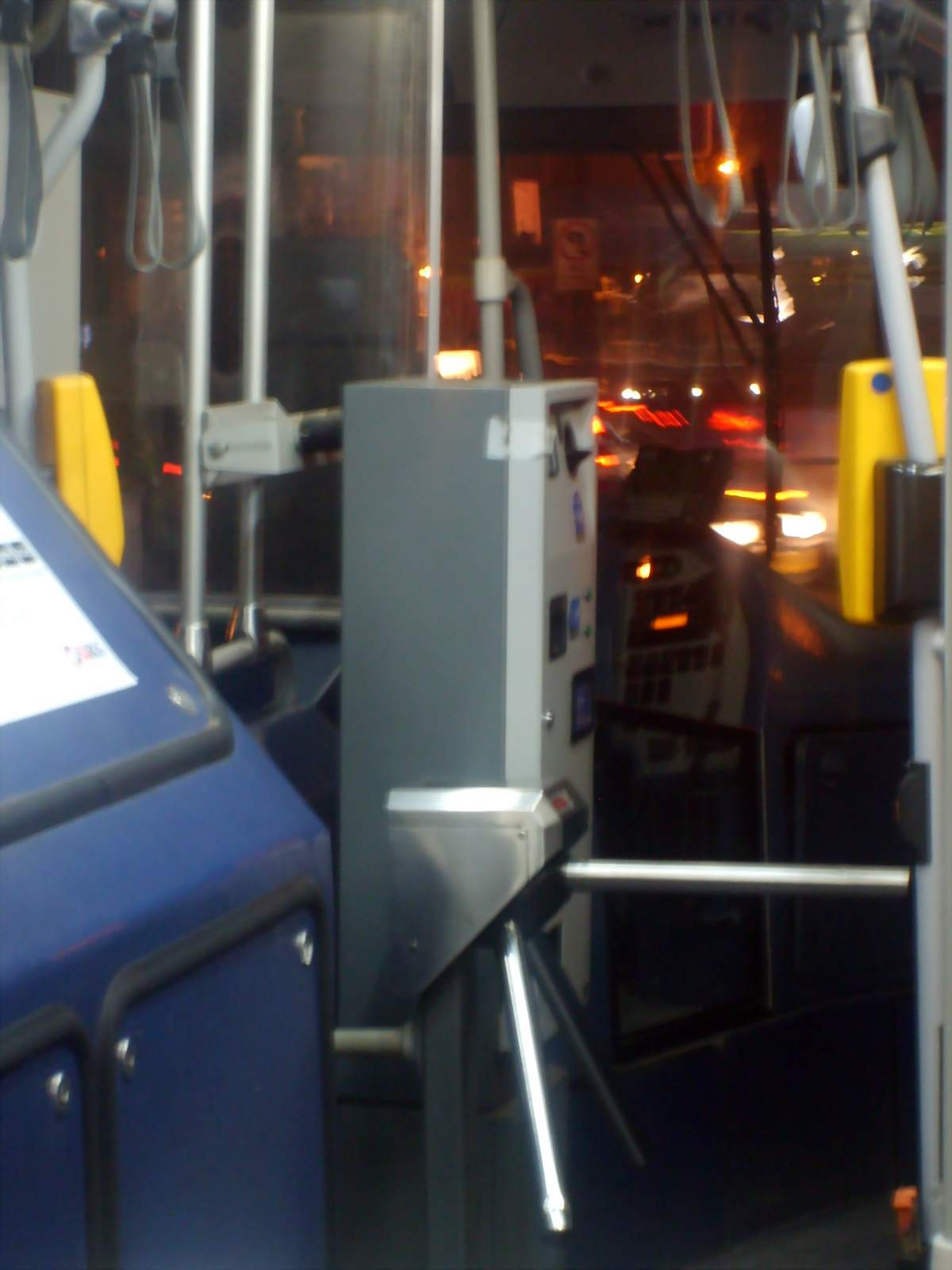 Fotografía de un antiguo cobrador automático dispuesto en un bus de Transantiago. Fue útil hasta el 9 de febrero de 2007.